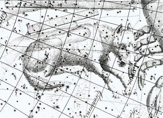 Lupus